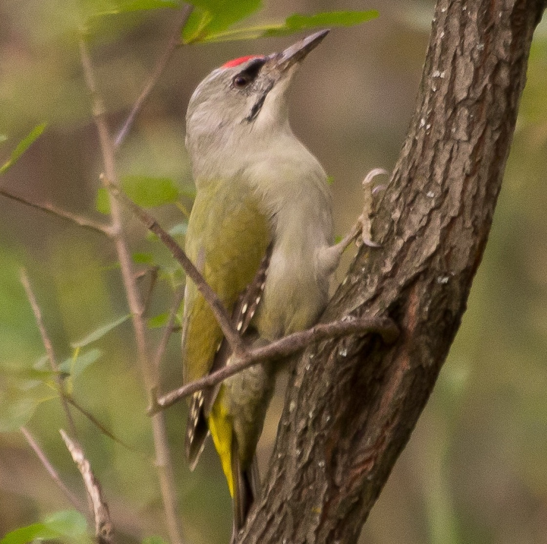 Седой дятел